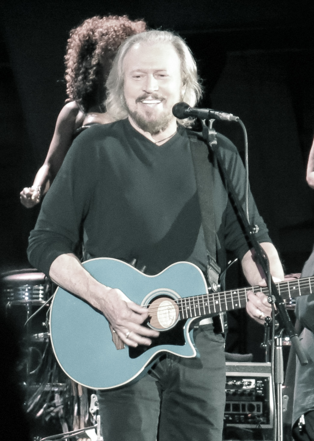 Barry Gibb Hollywood Bowl-0545